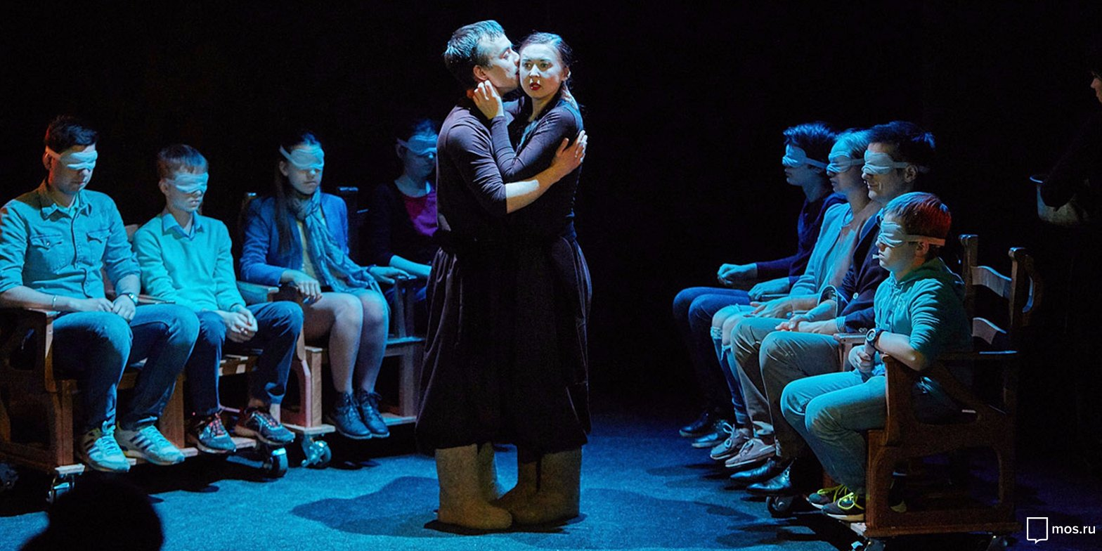 Спектакль "Майская ночь" в московском Театре кукол